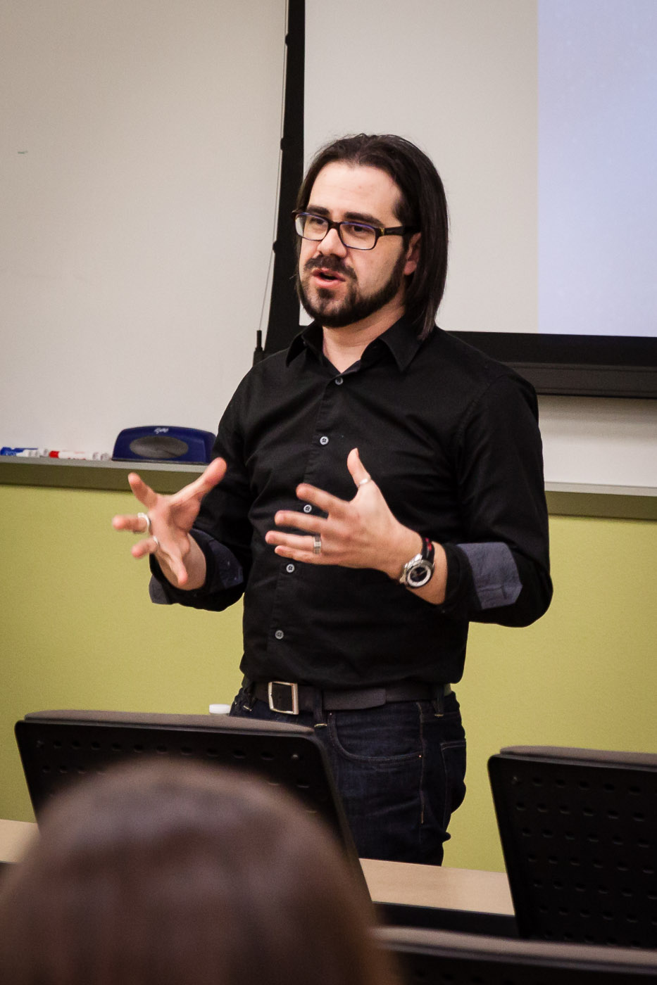 Keynote Speaker: Dr. Ian Bogost